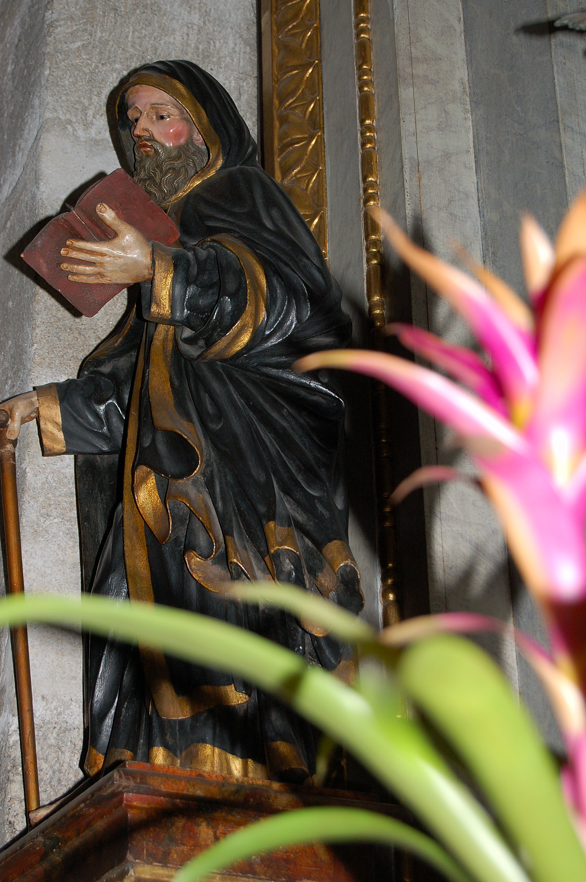 San Amaro na igrexa de San Bieito do Campo de en Santiago de Compostela